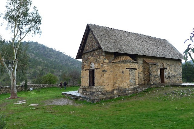 Panagia Forviothissa (Asinou) nahe Nikitari, Zypern.